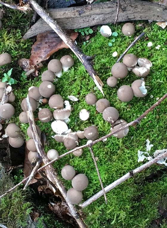 Zehirli mantarlar